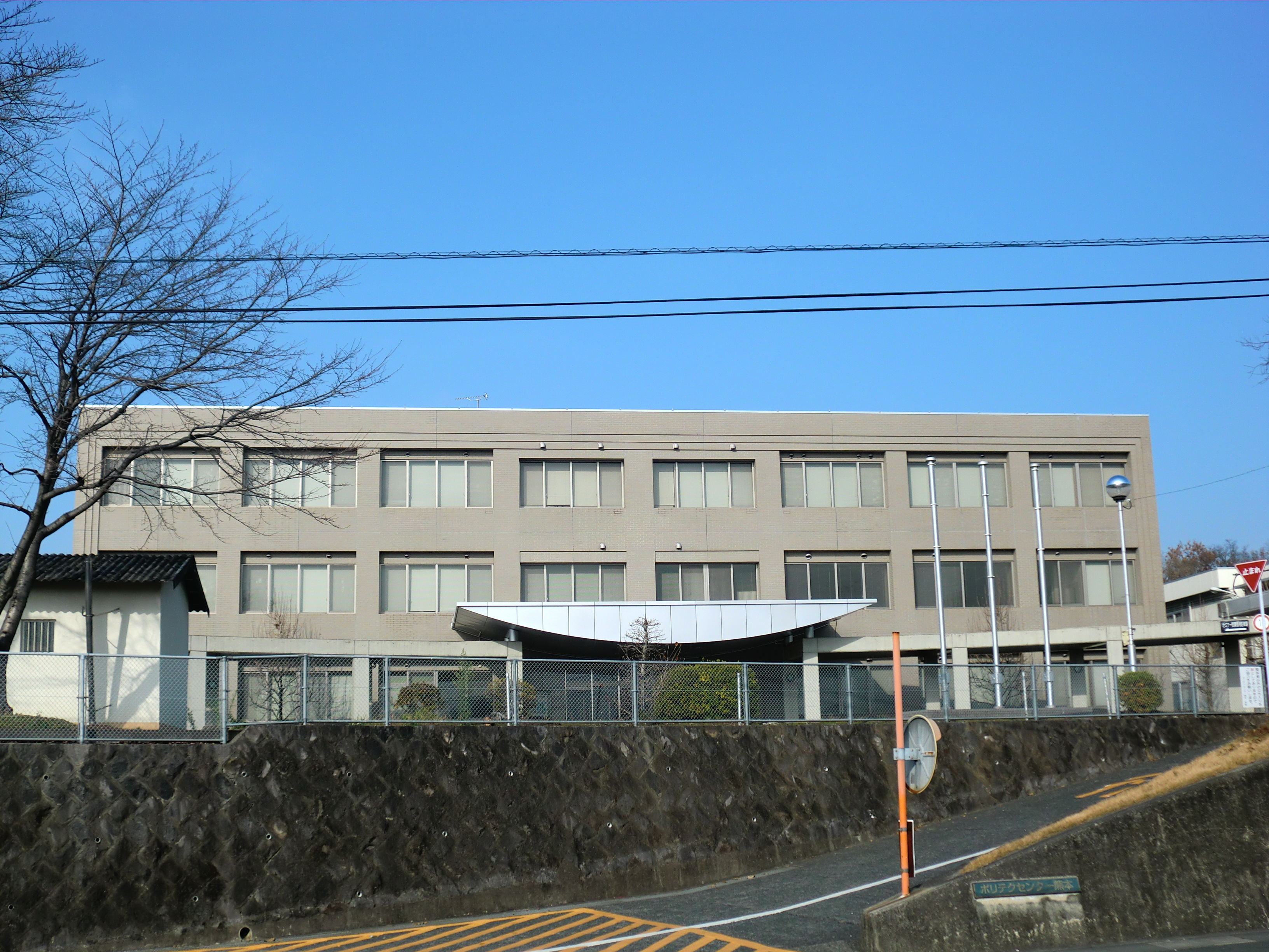 熊本県合志市にあるポリテクセンター熊本